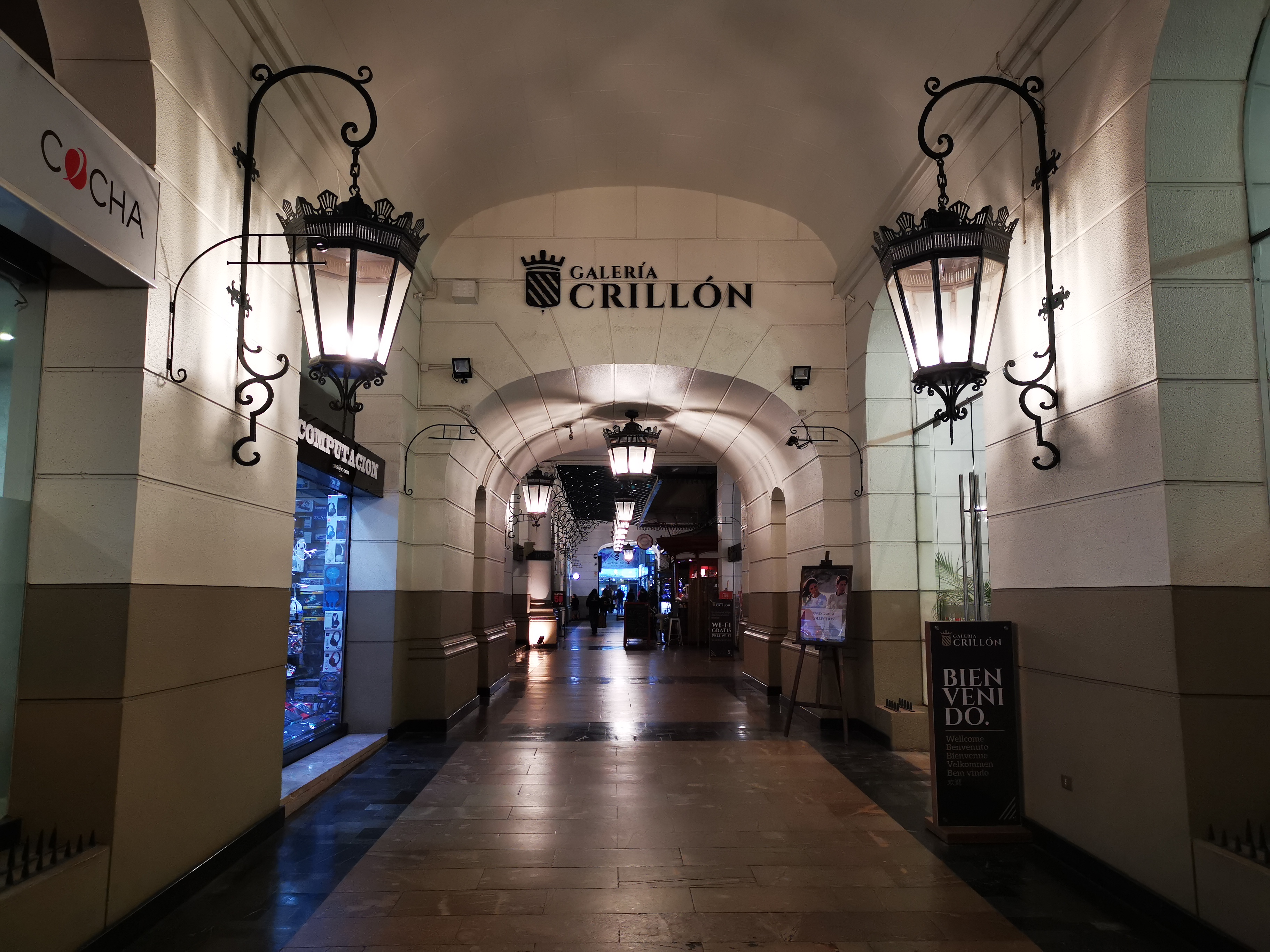 Galería Crillón, Santiago de Chile.